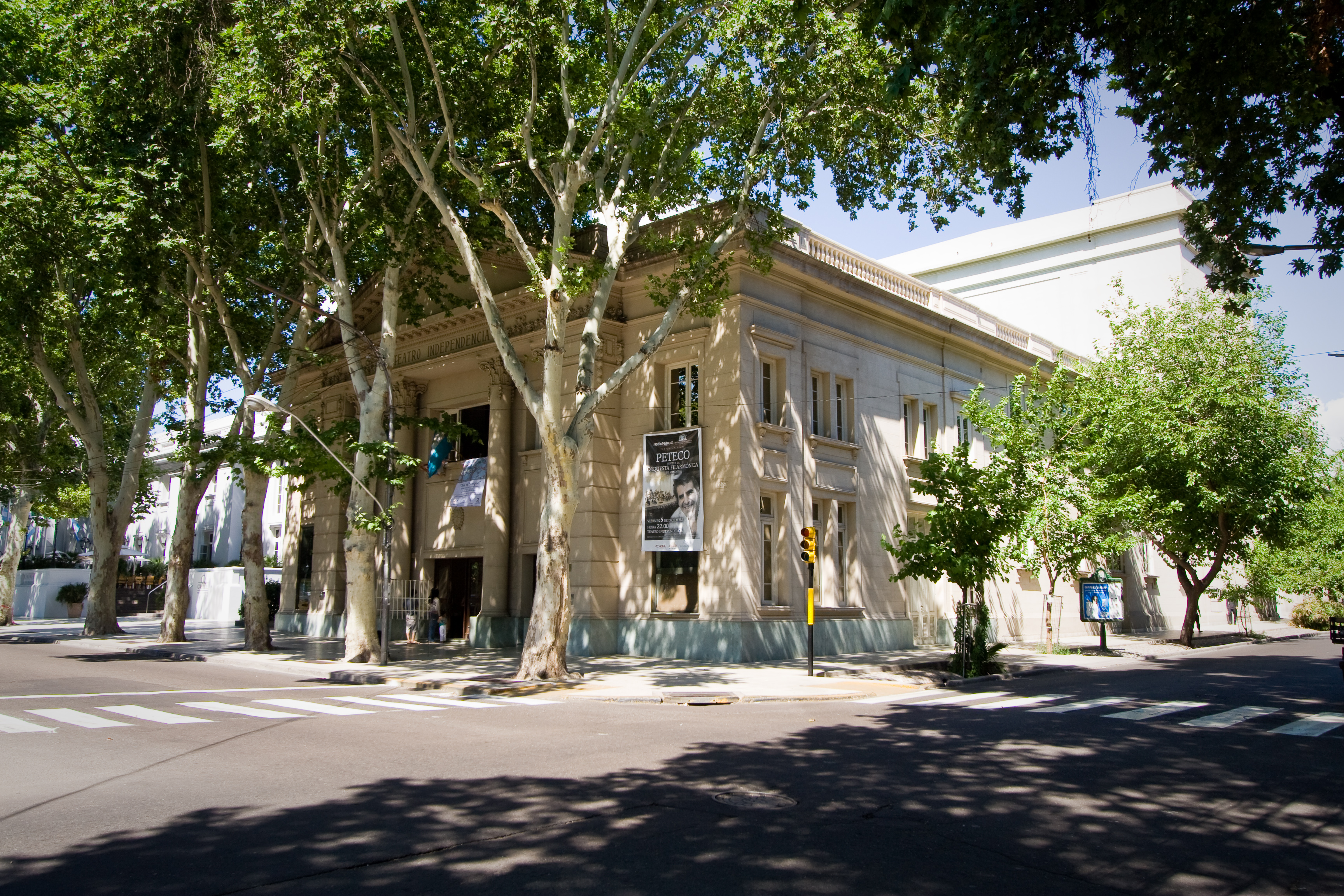 Teatro Independencia, Mendoza, Argentina.